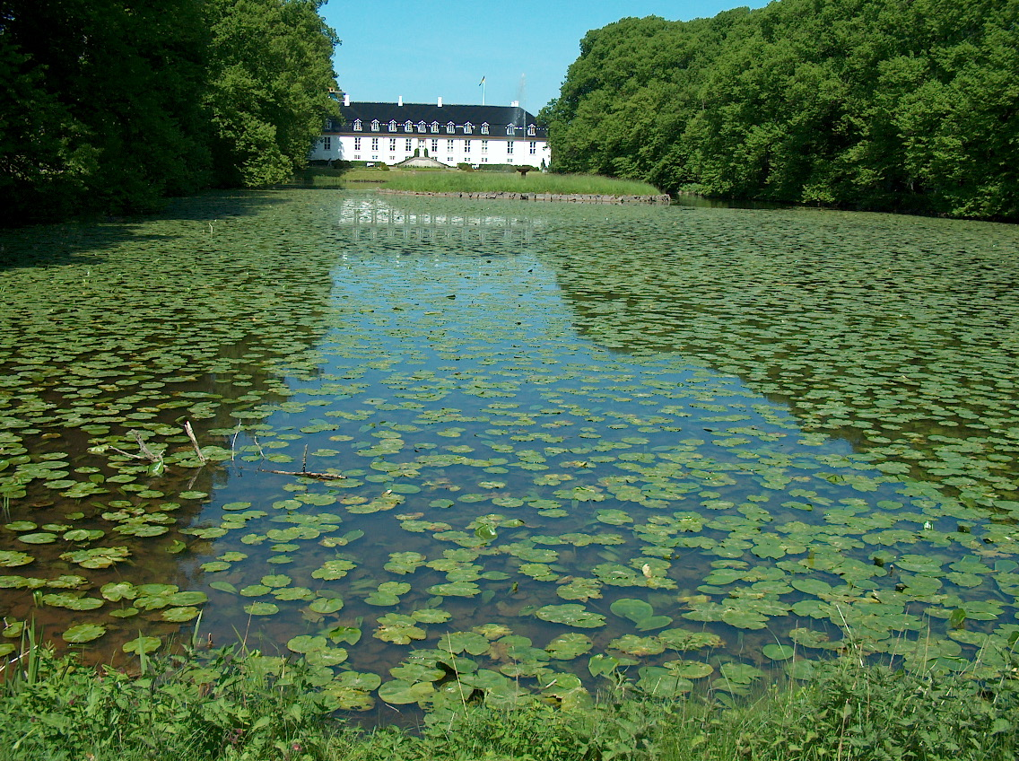 Glorup set fra slotssøen